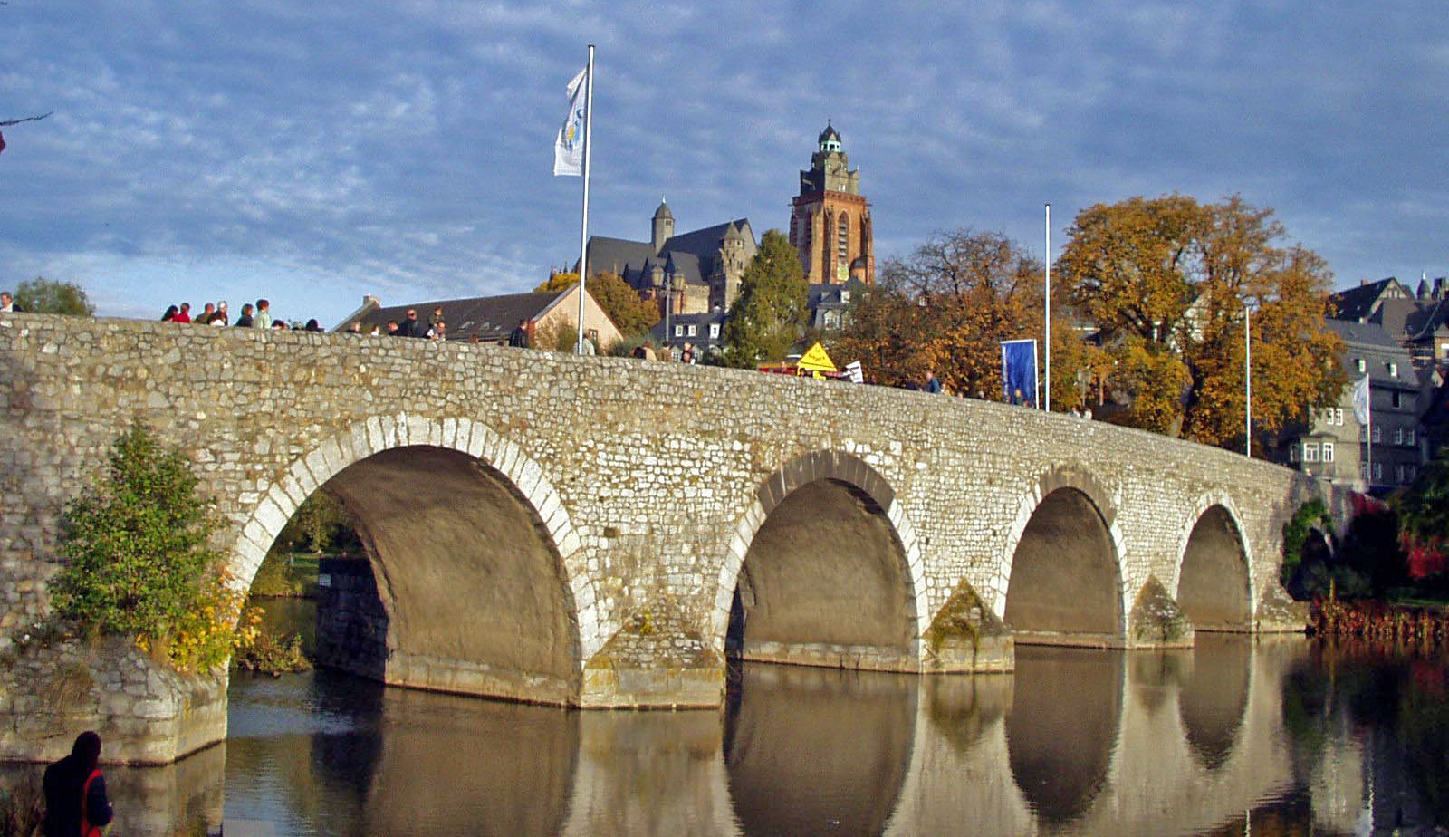 Sujet:Bréck iwwer d'Lahn zu Wetzlar Source:Stephan Mosel from Gießen, Germany; ex-Commons: verschafft vum "et gëtt och aner Formater wéi 4:3"